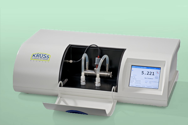 Polarimeter P8000 der A. Krüss Optronic GmbH, neue Version